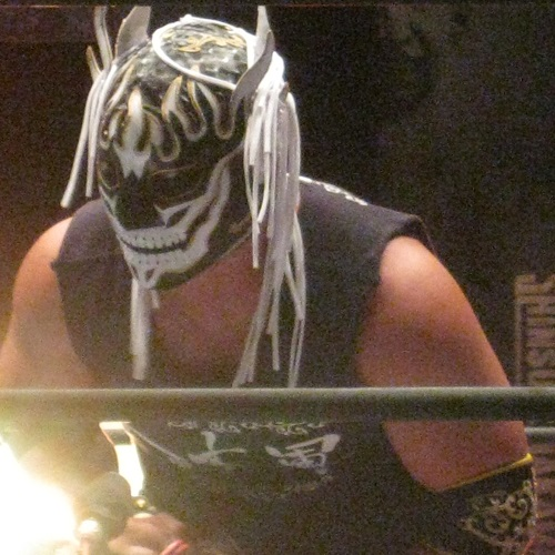 2014年9月21日 神戸ワールド記念ホール 「DESTRUCTION in KOBE」 エル・デスペラード